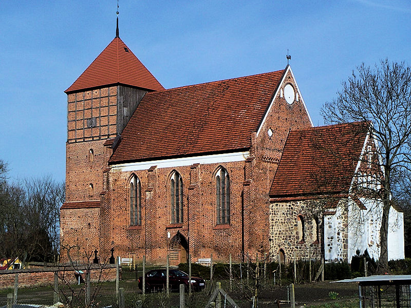 Kirche in Mestlin, Landkreis Parchim